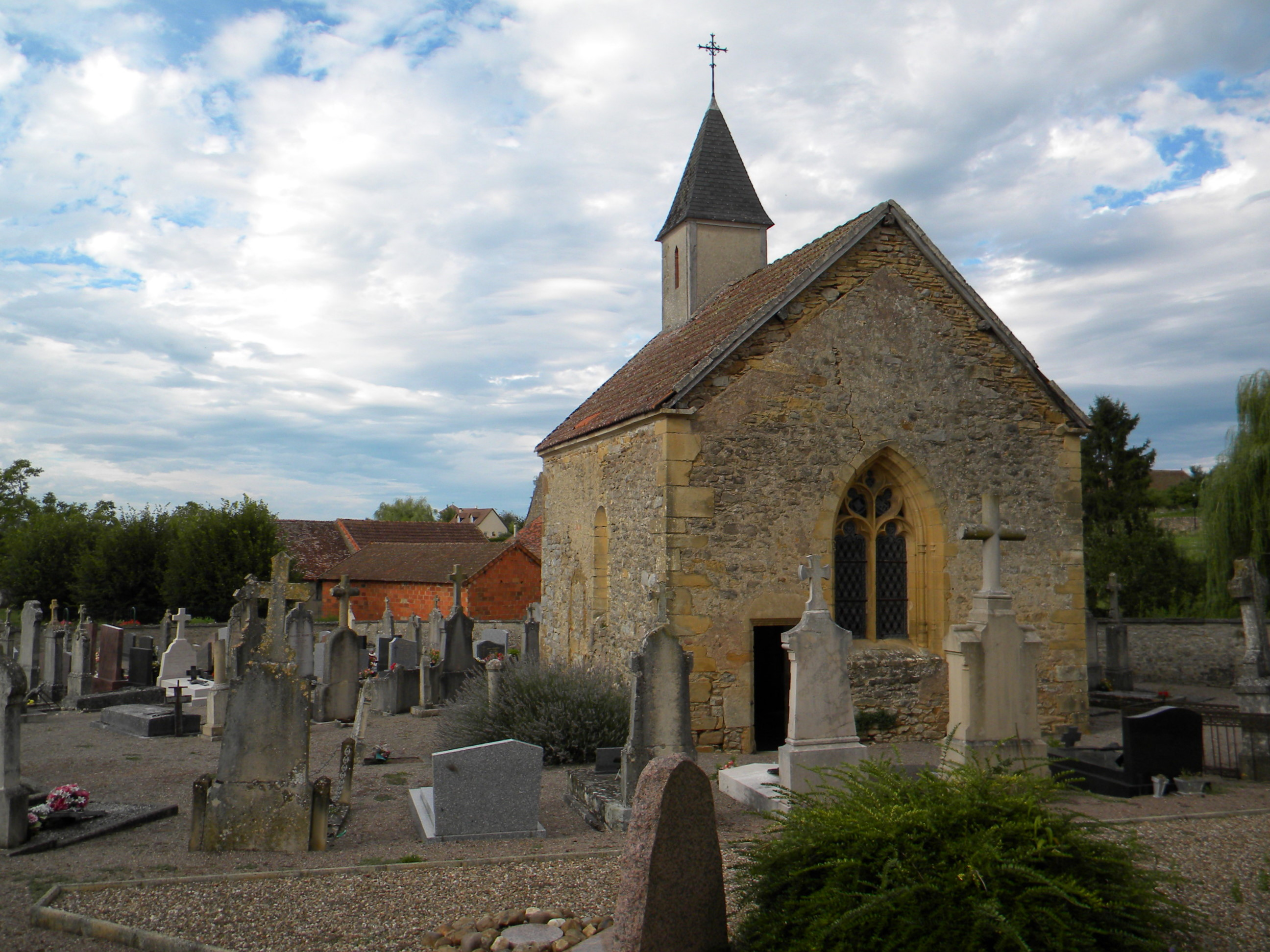 La chapelle du cimetière d 'Amanzé est l'ancien bras sud du transept de l'église médiévale